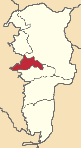 Mapa localizacor del cantón en Bolívar, Ecuador